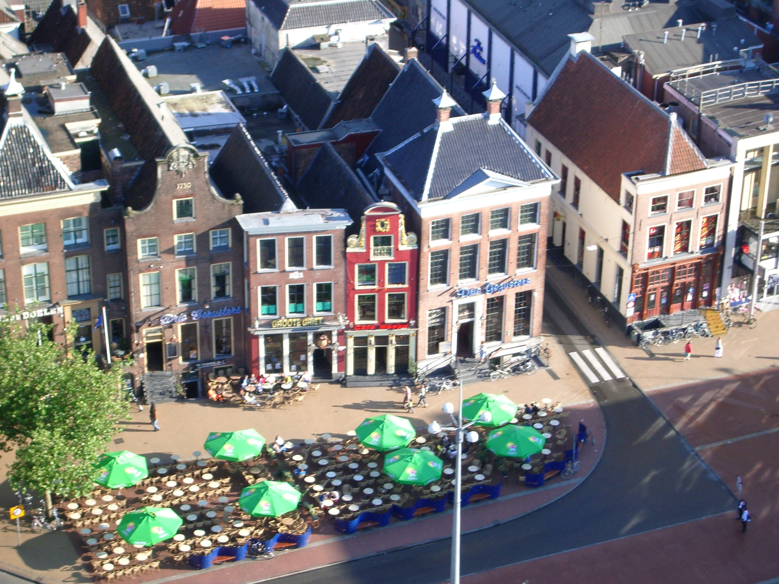 Eigen foto. Grote Markt Groningen, zuidzijde gefotografeerd vanaf de Martinitoren. Rechts het begin van de Gelkingestraat. This is an image of rijksmonument number 18468